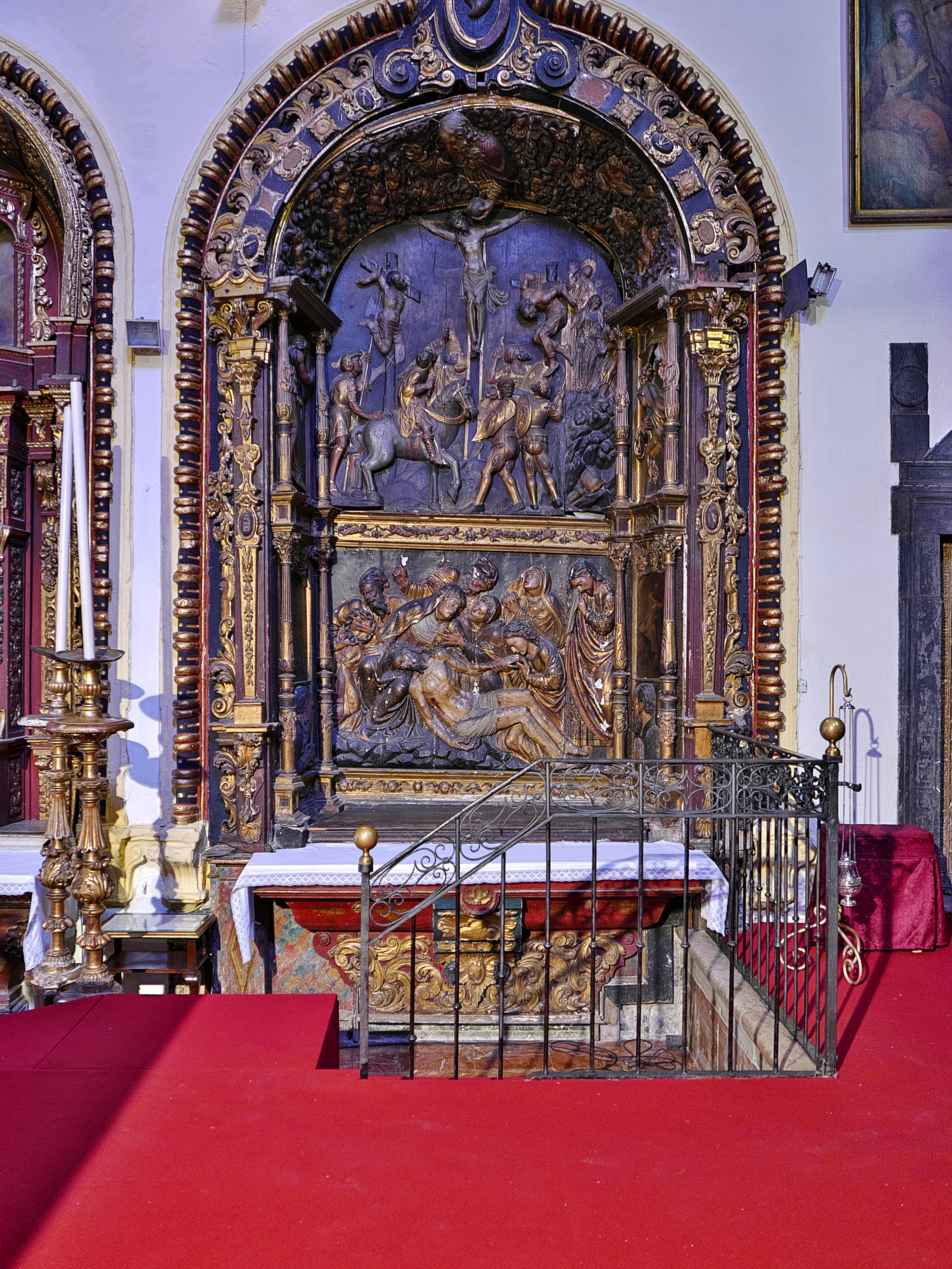 Retablo de los Cervantes. Interesante retablo manierista, segunda mitad del XVI (ca. 1560), atribuído a Isidro de Villoldo, o a Roque Balduque.